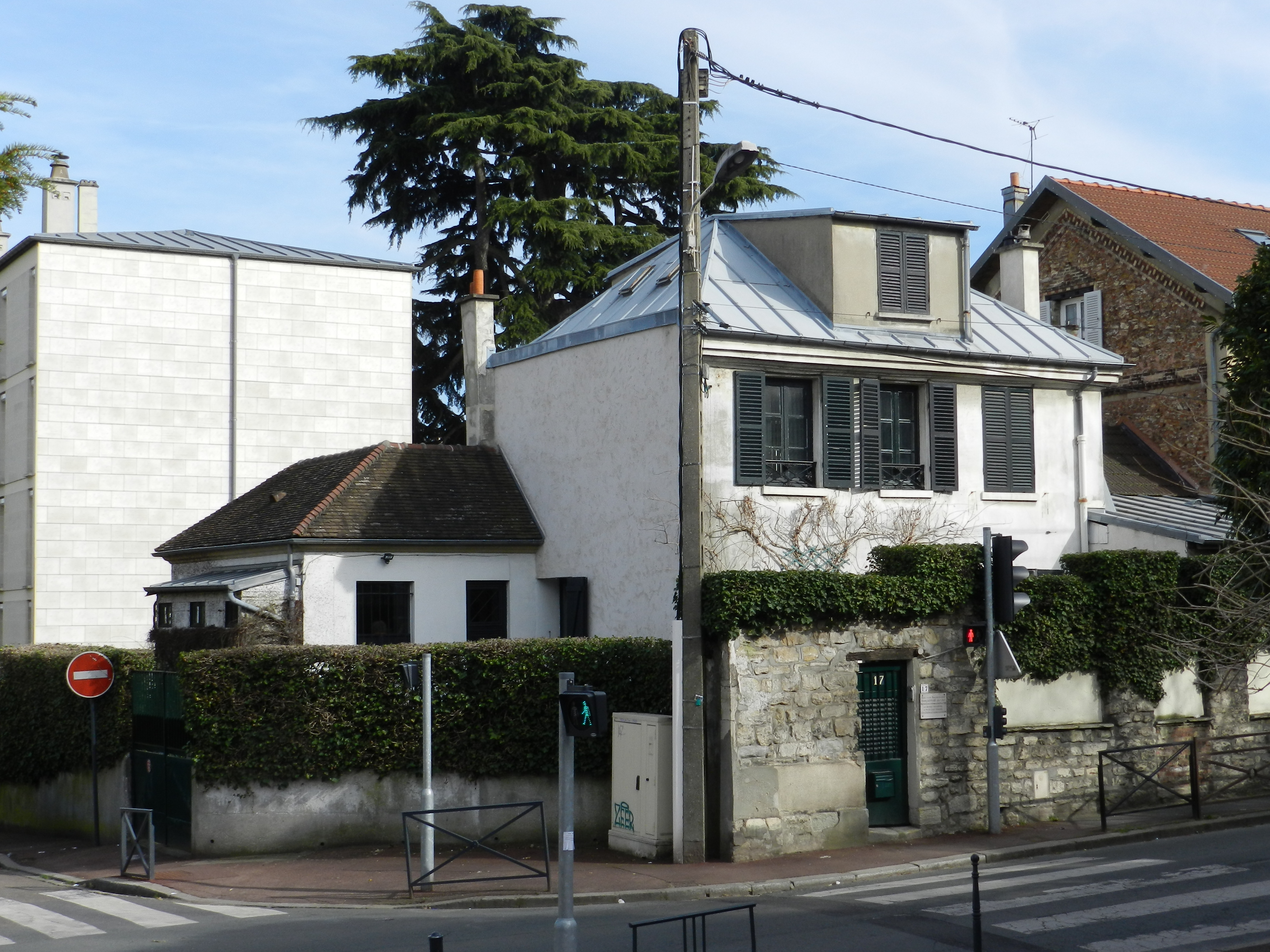 Maison de Fontenay-aux-Roses où naquit le peintre Pierre Bonnard.